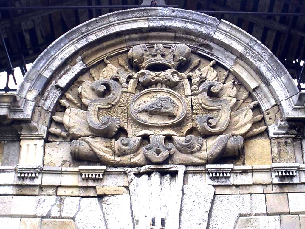 Srpskohrvatski / српскохрватски: Grb Tribalije, na jugozapadnoj strani Kapije Karla VI u Donjem gradu Beogradske tvrđave. U centralnom medaljonu se nalazi probodena veprova glava, koja će se kasnije nalaziti na Karađorđevoj zastavi.